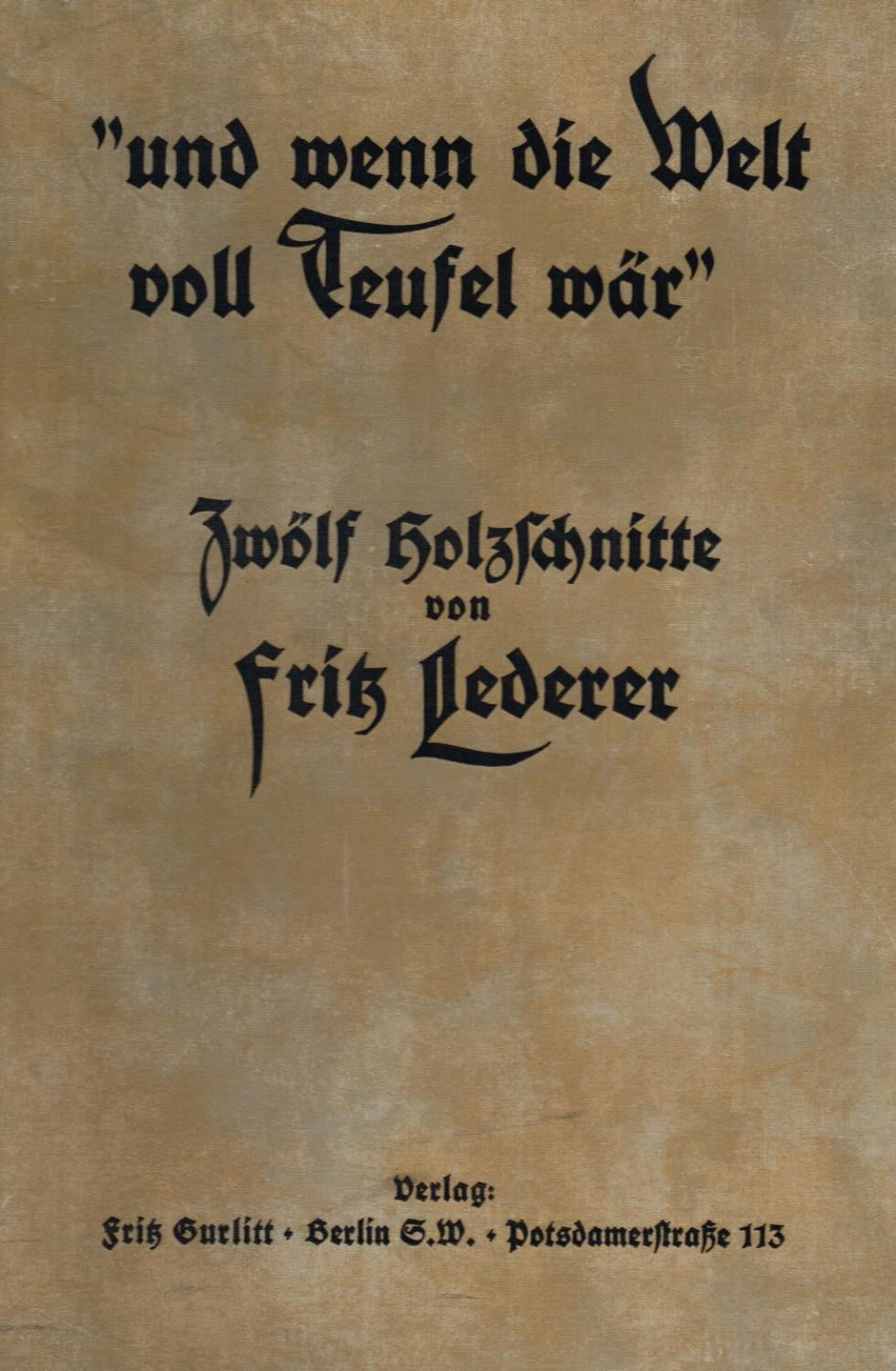 Fritz Lederer und wenn die Welt voll Teufel wär Titel